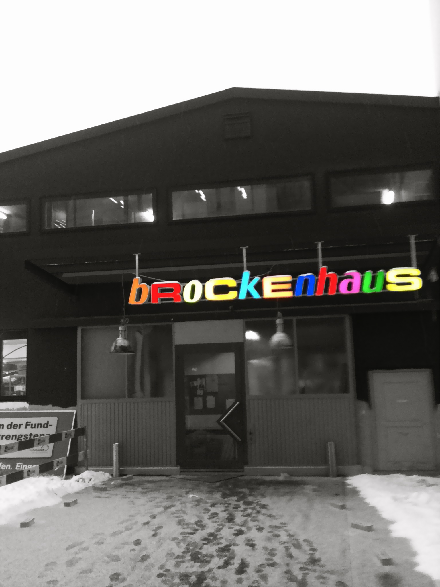 brockenhaus Arche